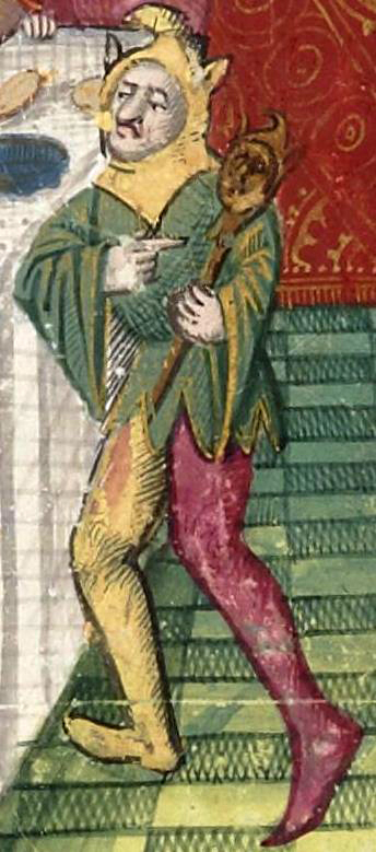 Шут. Фрагмент миниатюры "Gaharié recevant le chapel" из "Романа о Ланселоте" (Français 112 (1), fol. 45), ок. 1470